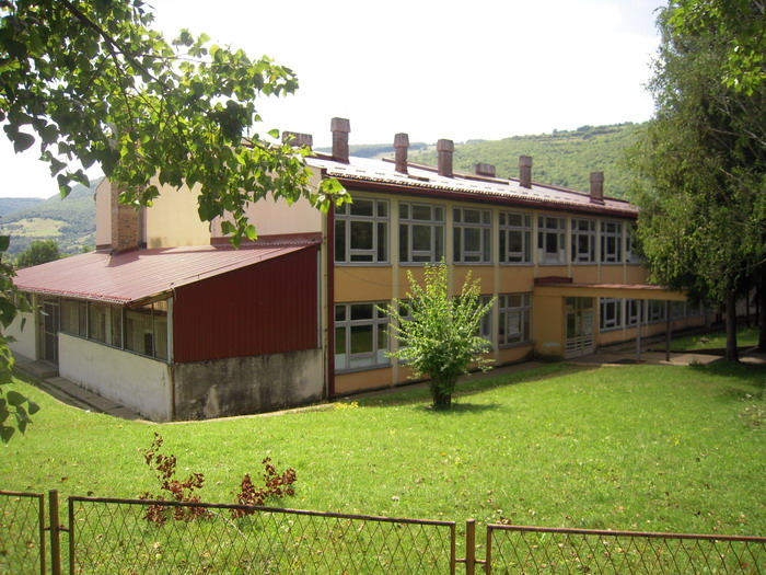 Osnovna_škola_u_Bočcu